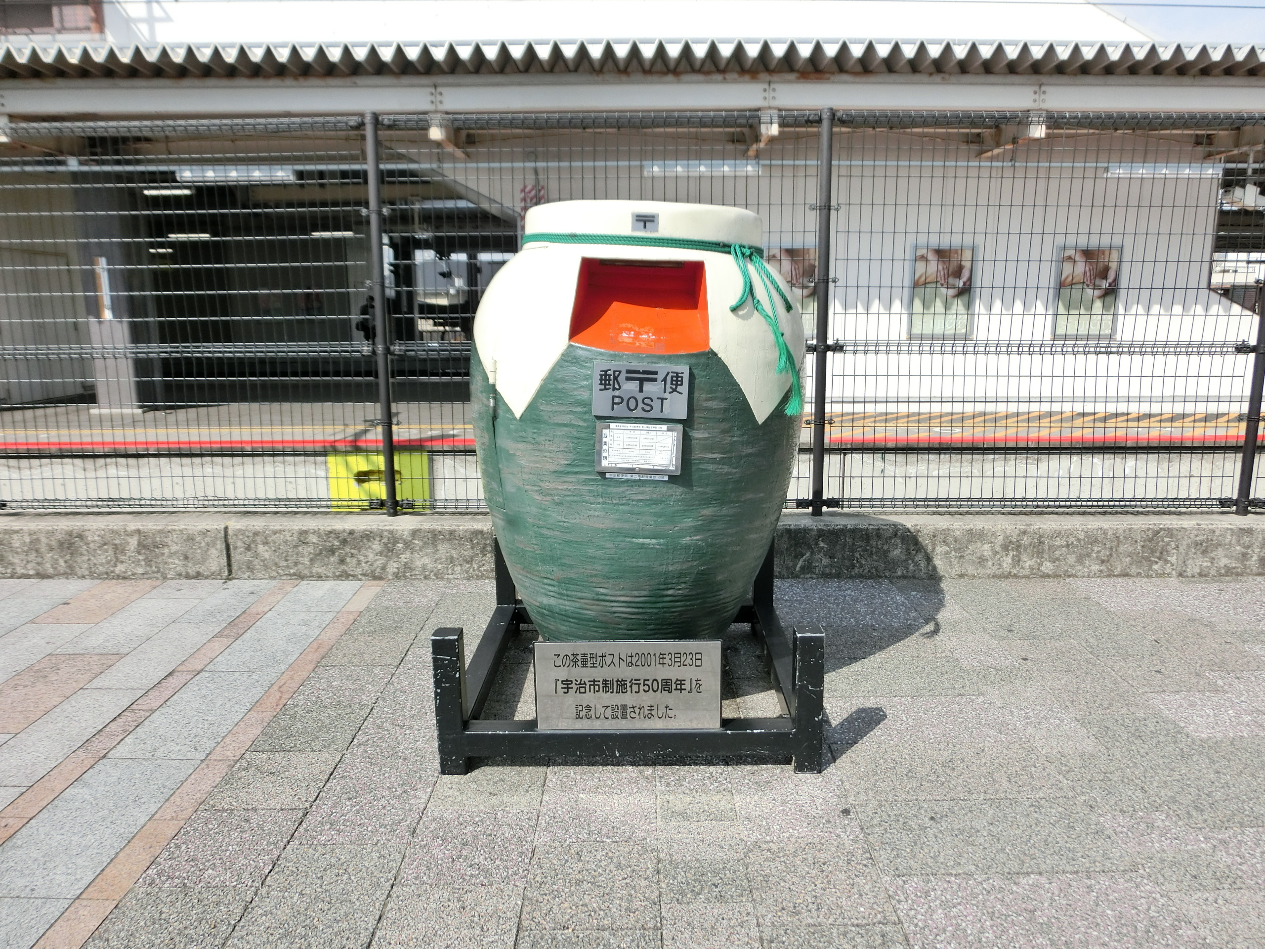 JR宇治駅前の茶壷型の郵便ポスト